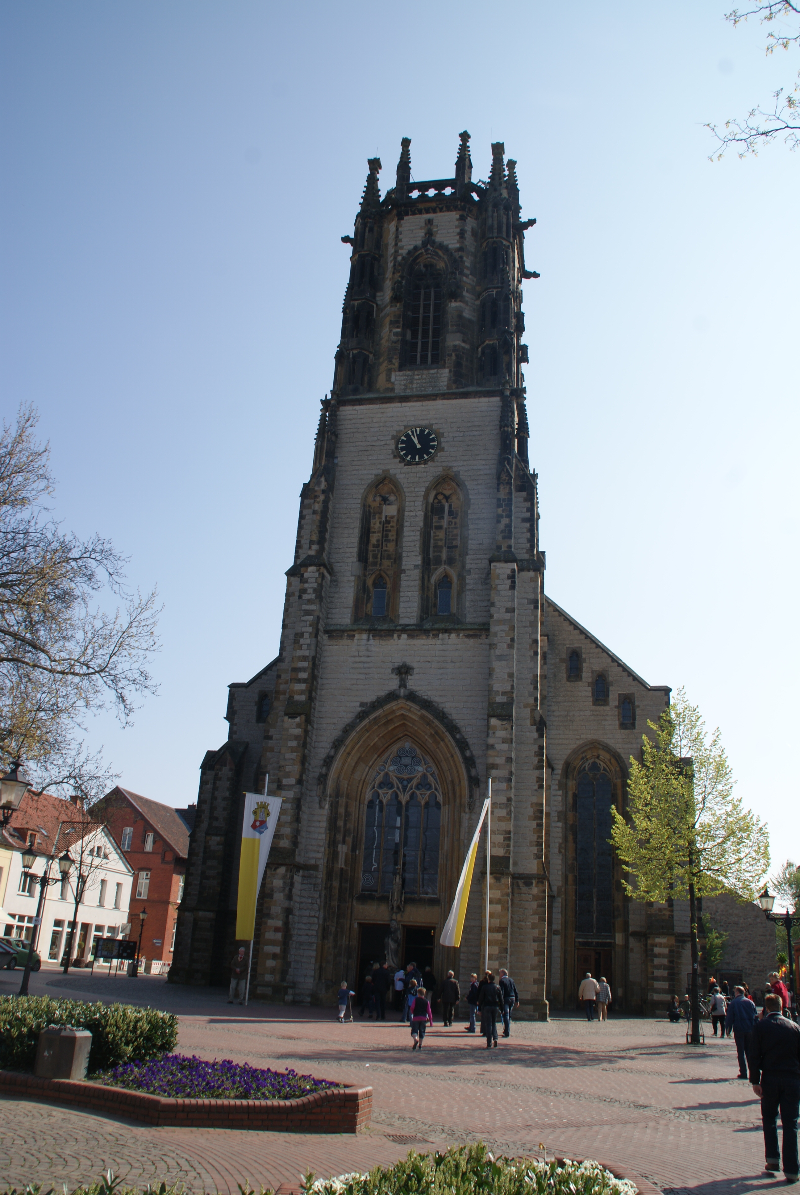 Sankt Johannes der Täufer (Kirche im westfälischen Oelde)